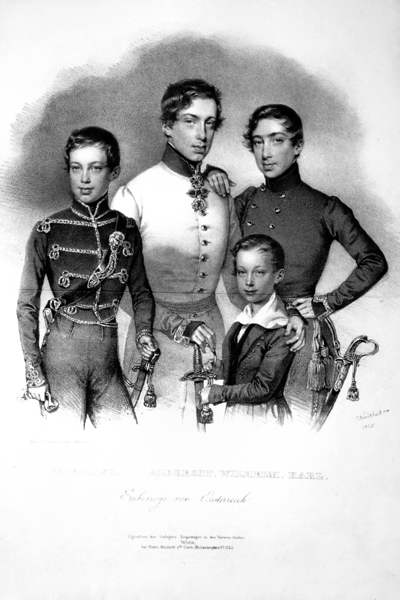 Die Söhne Wilhlm Albrecht Friedrich Karl des Erzherzogs Karl, Lithographie von Josef Kriehuber, 1835